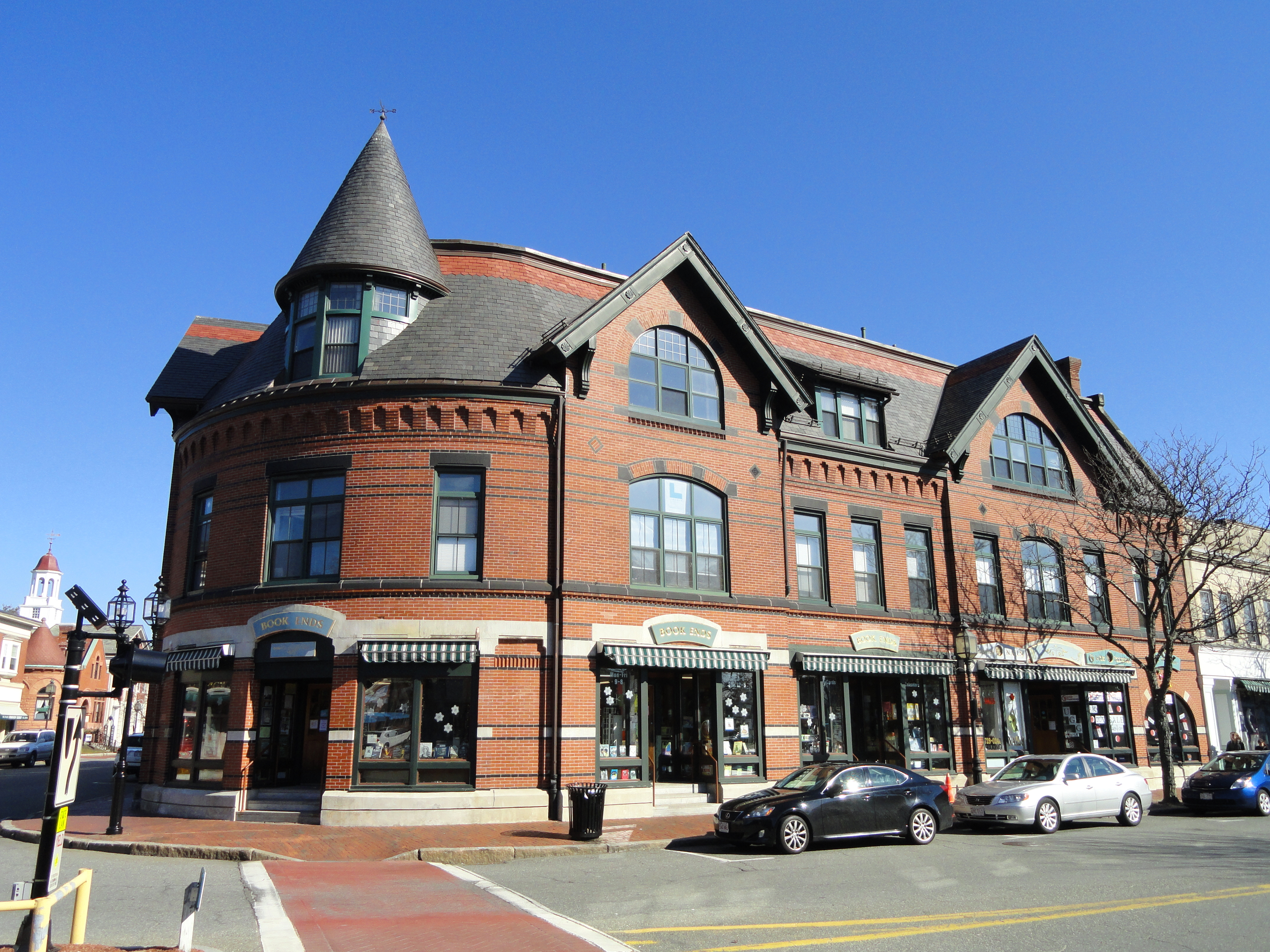 Building in Winchester, Massachusetts, USA.